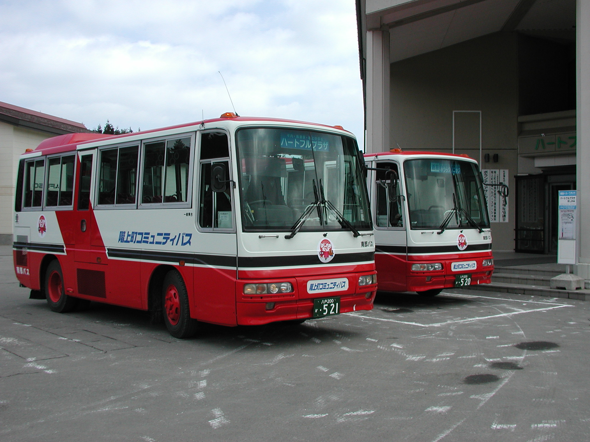 南部バス 「階上町コミュニティバス」（三菱ふそう・エアロミディMJ：KC-MJ218F）の2台並びとバス停留所 ハートフルプラザ階上にて